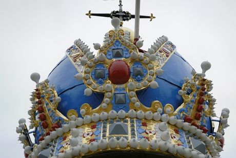 Kroon op Westerkerk Amsterdam